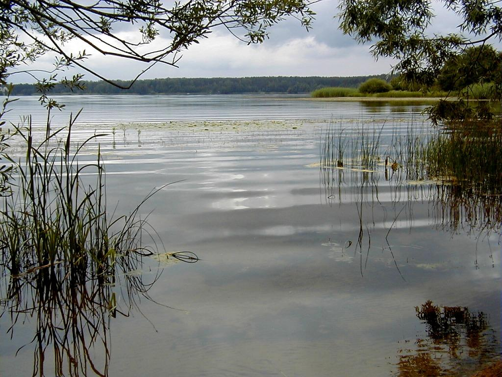 Kategorija:Ādažu novads